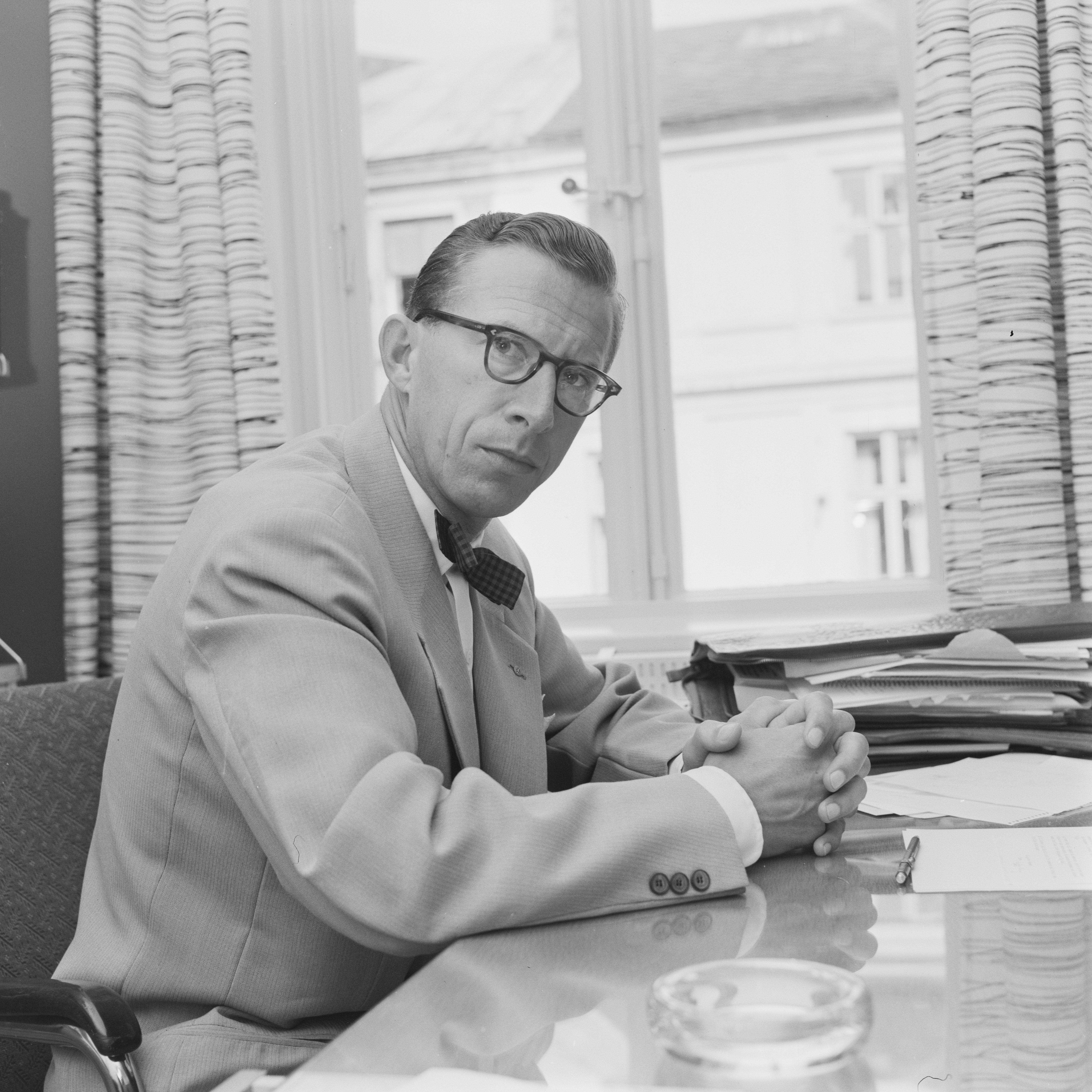 Bildet er hentet fra Arkivverket. Trygve de Lange Arkivinstitusjon : Riksarkivet Arkivnavn : Billedbladet NÅ Sted : Norge, Oslo, Oslo, Ukjent Emneord: Menn, Norske advokater, Høyre-politikere Avbildet